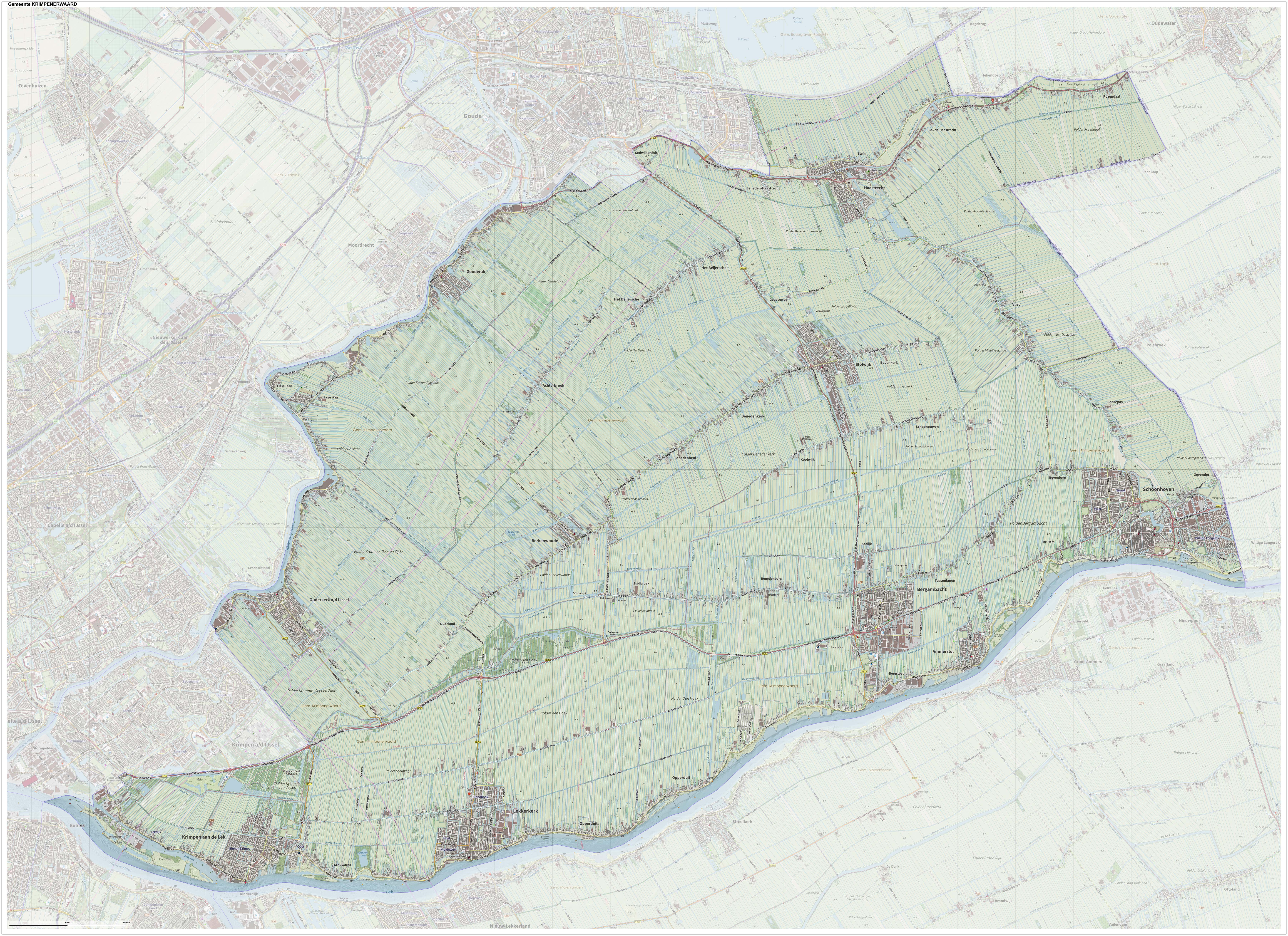 Topografische kaart van de gemeente Krimpenerwaard. Resolutie: 400 pixels/km. Kaartbeeld samengesteld uit de open geodata van de Top10NL en Top25namen (Kadaster), Creative Commons-BY licentie. Gebouwvlakken uit open geodata BAG extract. Wegen uit de OpenStreetMap, OpenStreetMap community. Reliëfschaduw uit de Actuele Hoogtekaart AHN2. Samenstelling en kleurenschema: Jan-Willem van Aalst, met QGIS. Zie ook de Legenda.